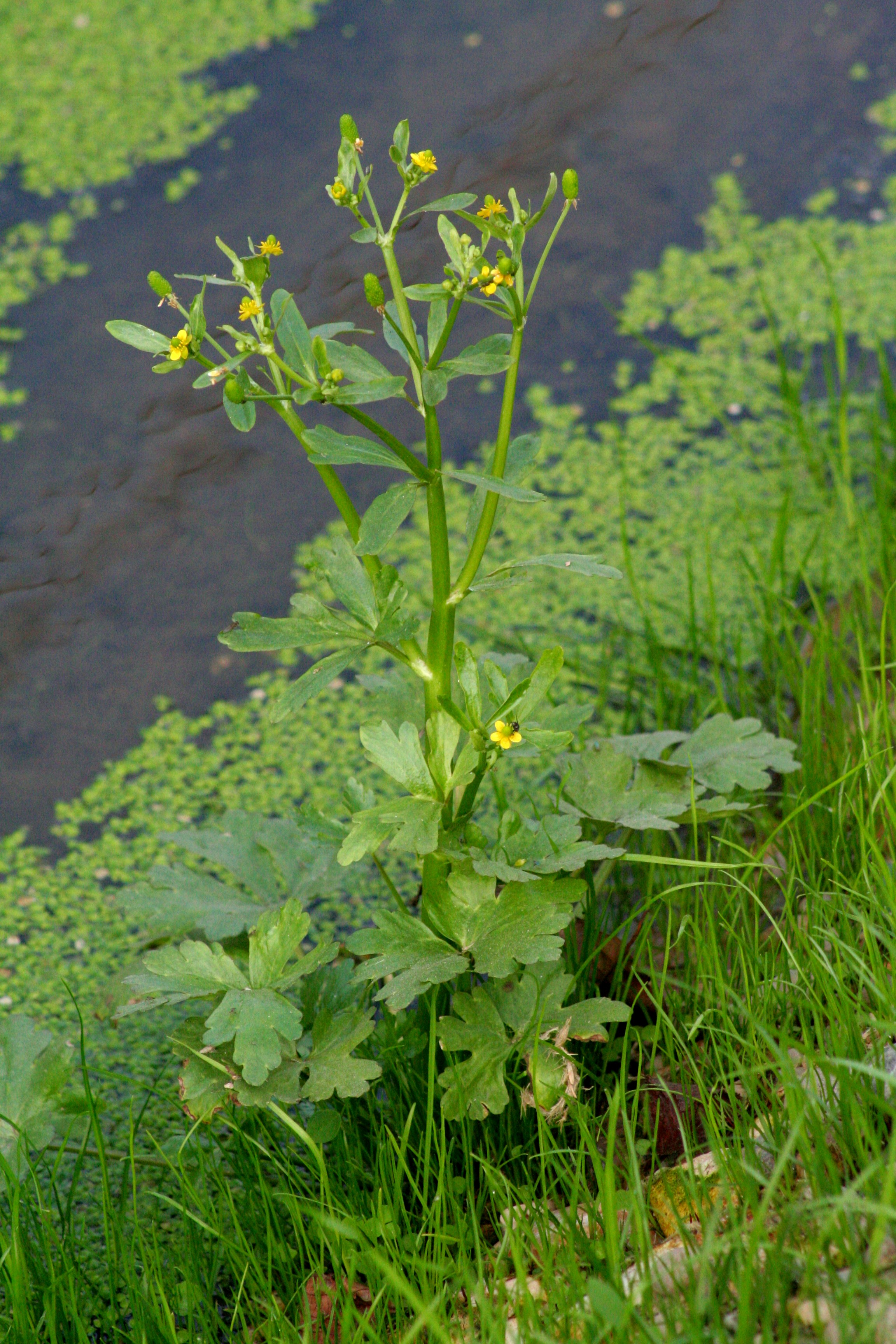 Ranuncolo di palude - Località: Canizzano (TV), 10 m s.l.m.